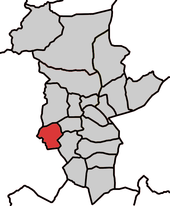 Situación da parroquia de Aldixe no concello de Abadín